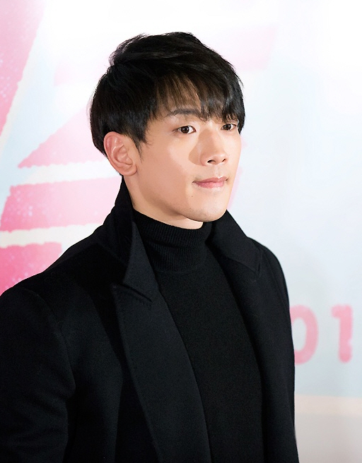 140120 피 끓는 청춘 vip시사회-비